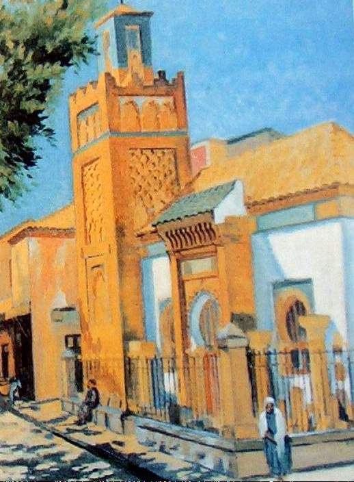 oeuvre de B. Yelles. Mosquée de Sidi Bellahsen